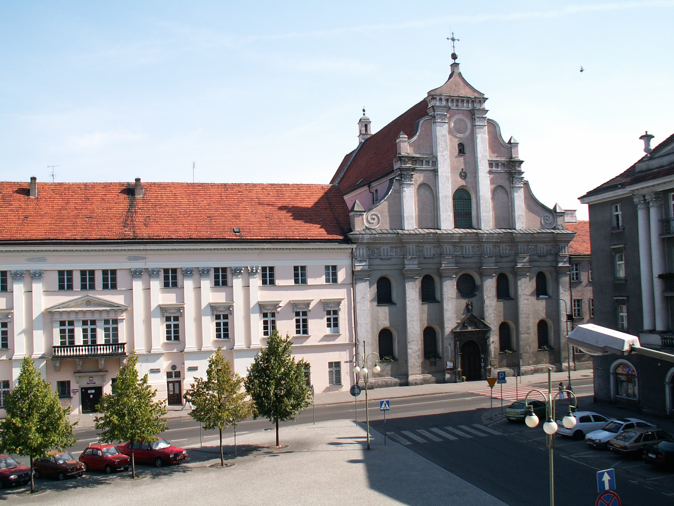 Kalisz, zespół klasztorny jezuitów, XVI, XIX